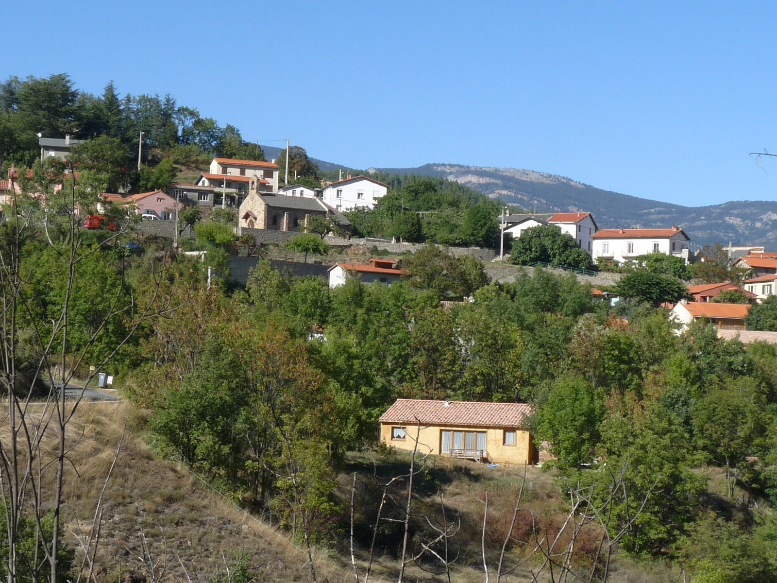 Escaro, Pyrénées-Orientales, France